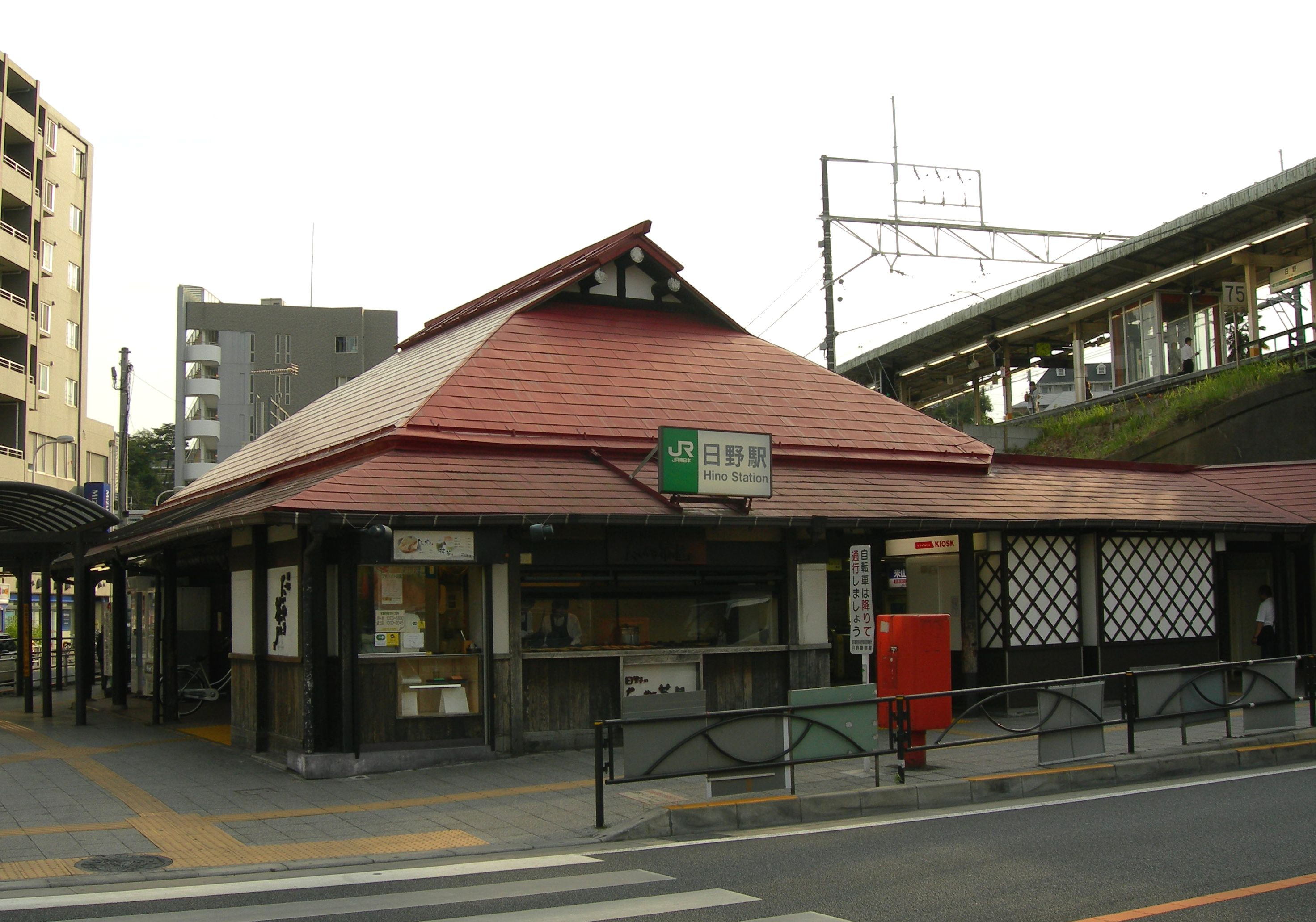 日野駅 (東京都)